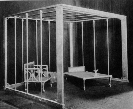 Rekonstruierter Baldachin aus dem Grab der Hetepheres (G 7000x), Giza, 4. Dynastie, ca. 2600 v. Chr, heute im Ägyptischen Museum Kairo (JE 57711)